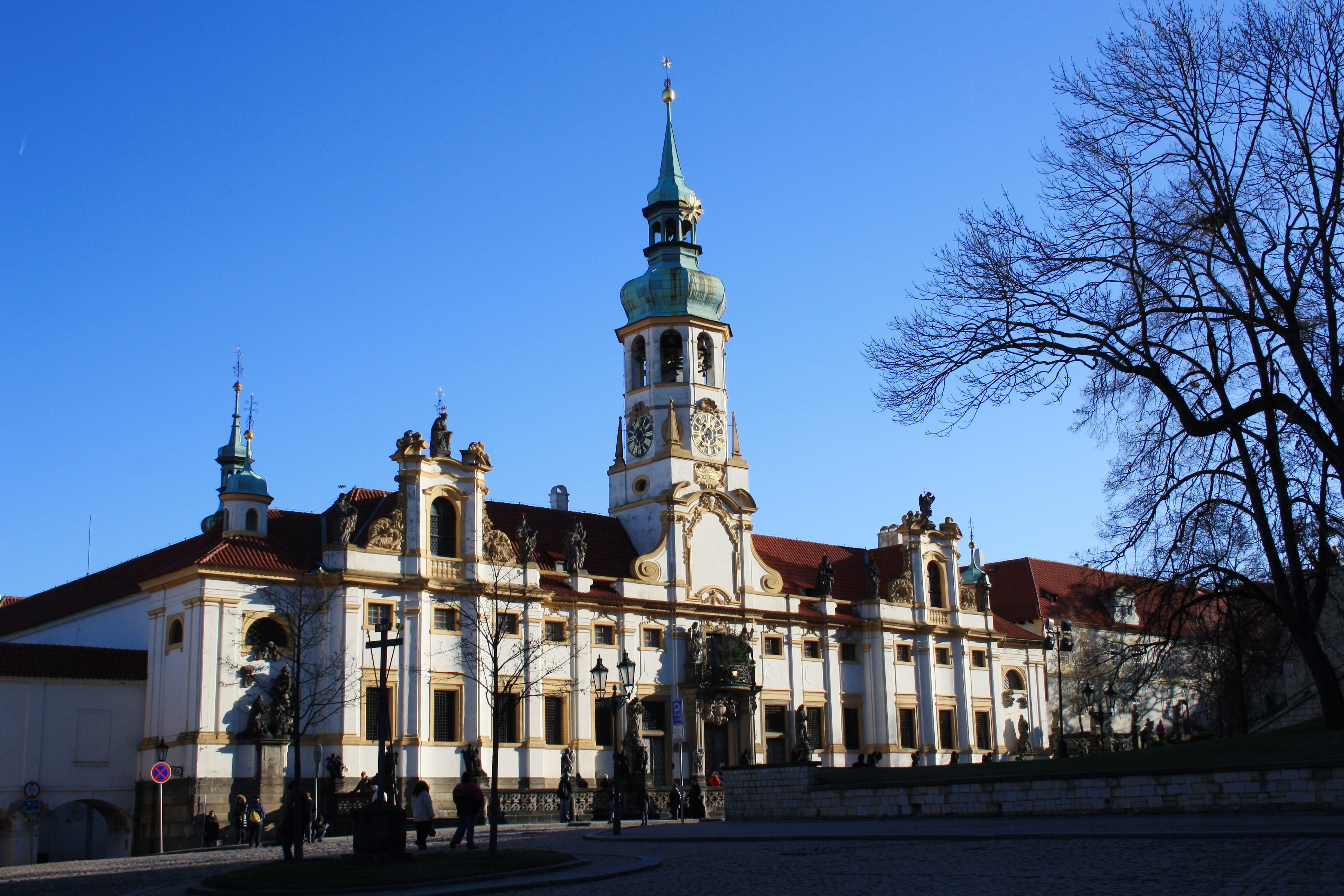 Loreto